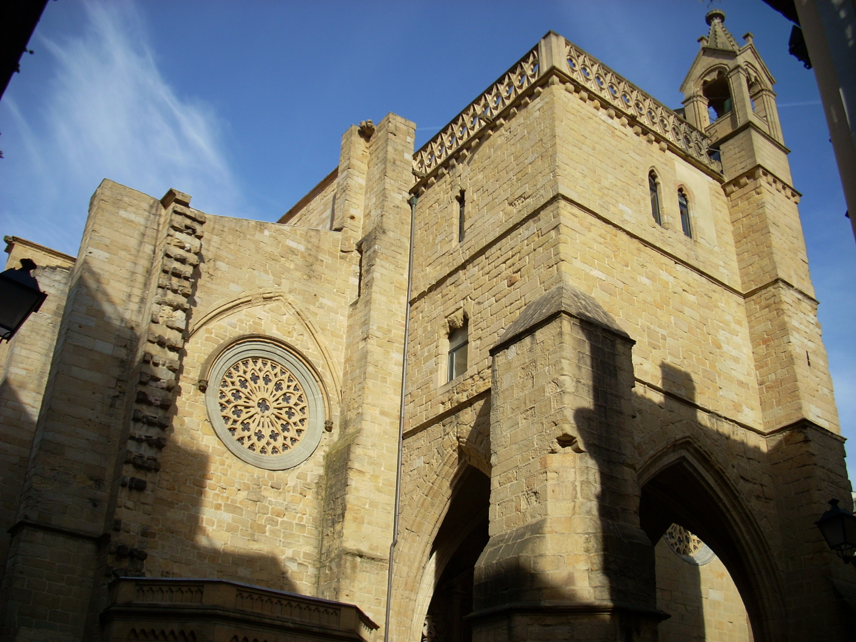 San Bizente eliza, Donostia, Gipuzkoa, Euskal Herria